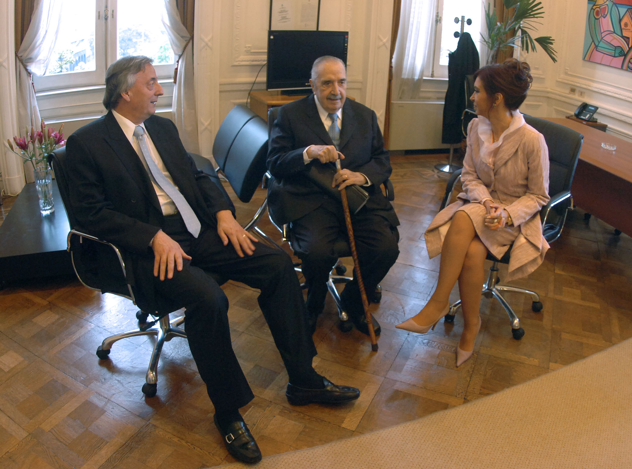 La presidente Cristina Fernández, junto a los ex presidentes Raúl Alfonsín y Néstor Kirchner, antes del acto de homenaje al dirigente radical